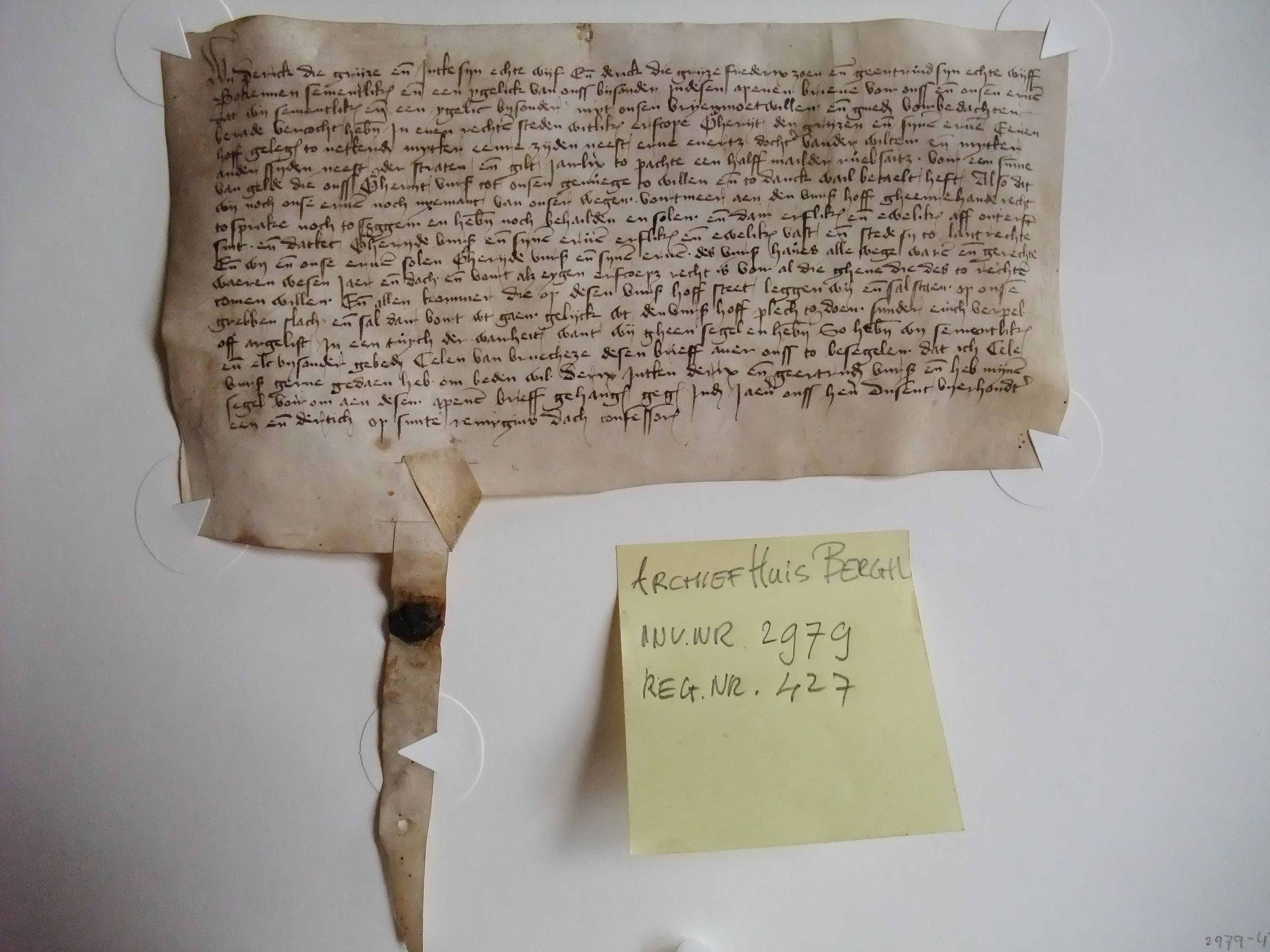 1e beschrijving van het St. Walburgisgilde uit 1431